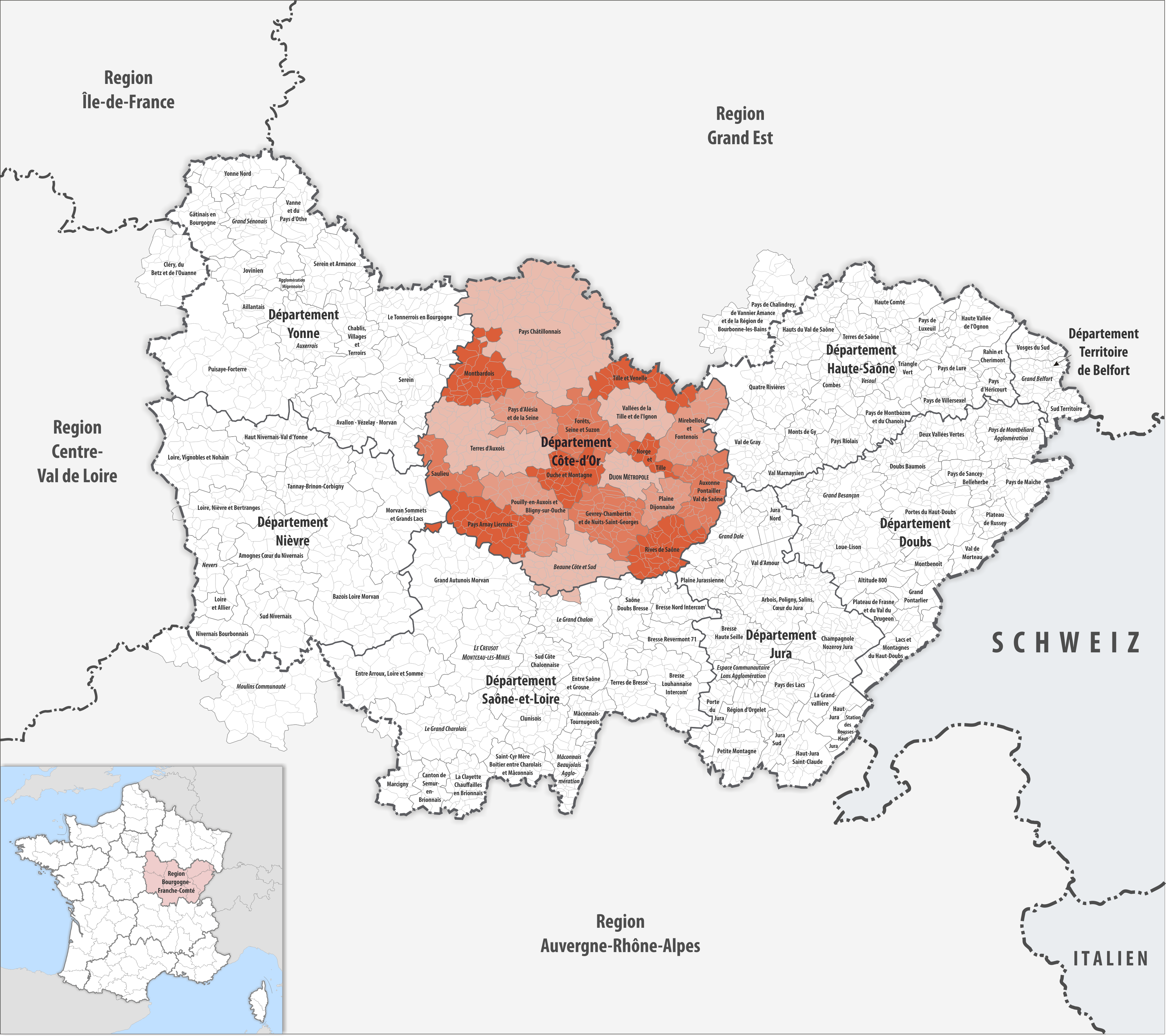 Gemeindeverbände im Département Côte-d’Or